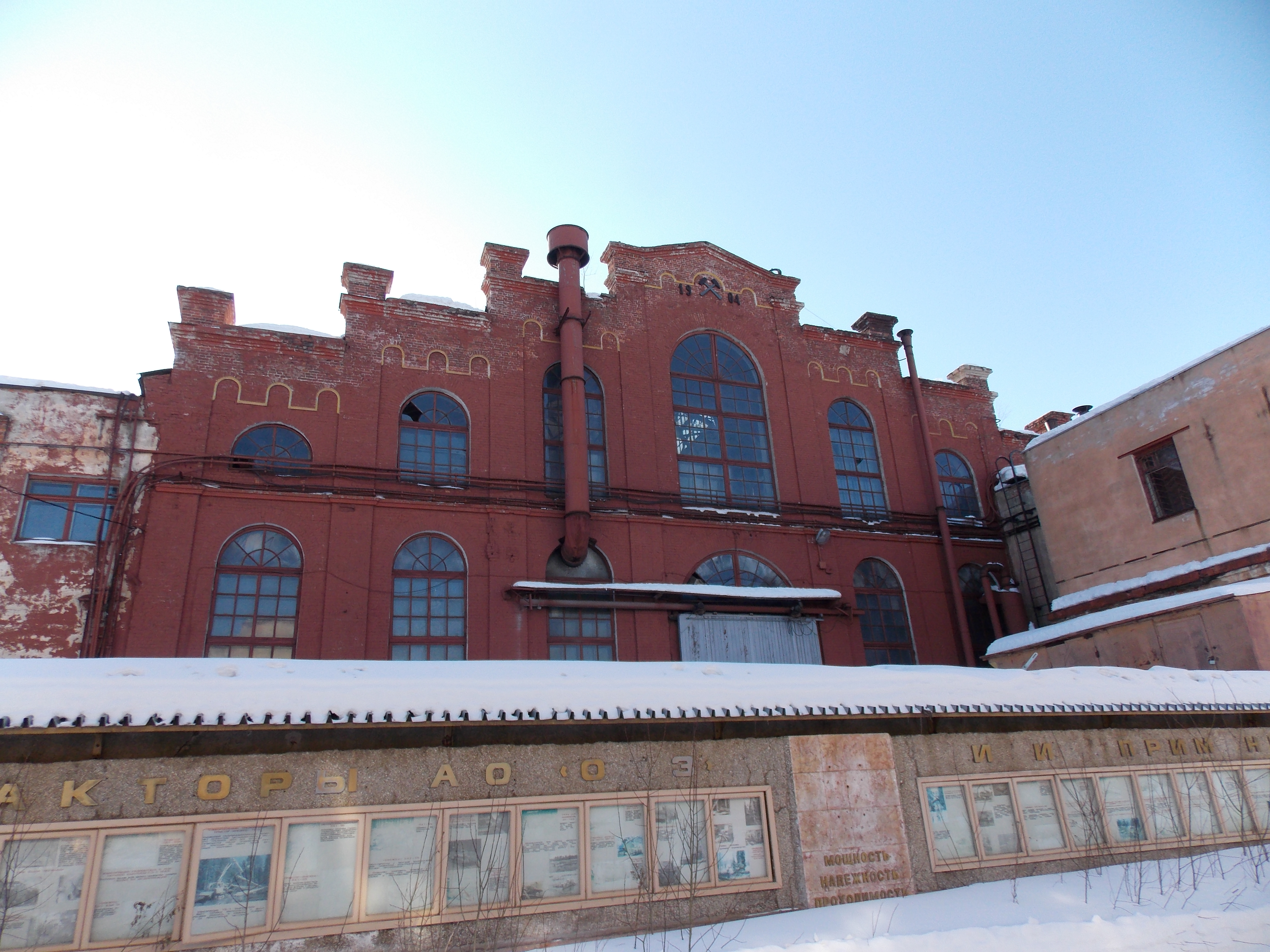 РМЦ ОТЗ, Петрозаводск